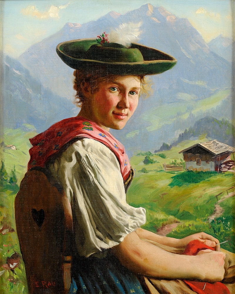 Ein hübsches Dirndl. Signiert. Öl auf Leinwand/Malkarton, 45 x 36 cm.